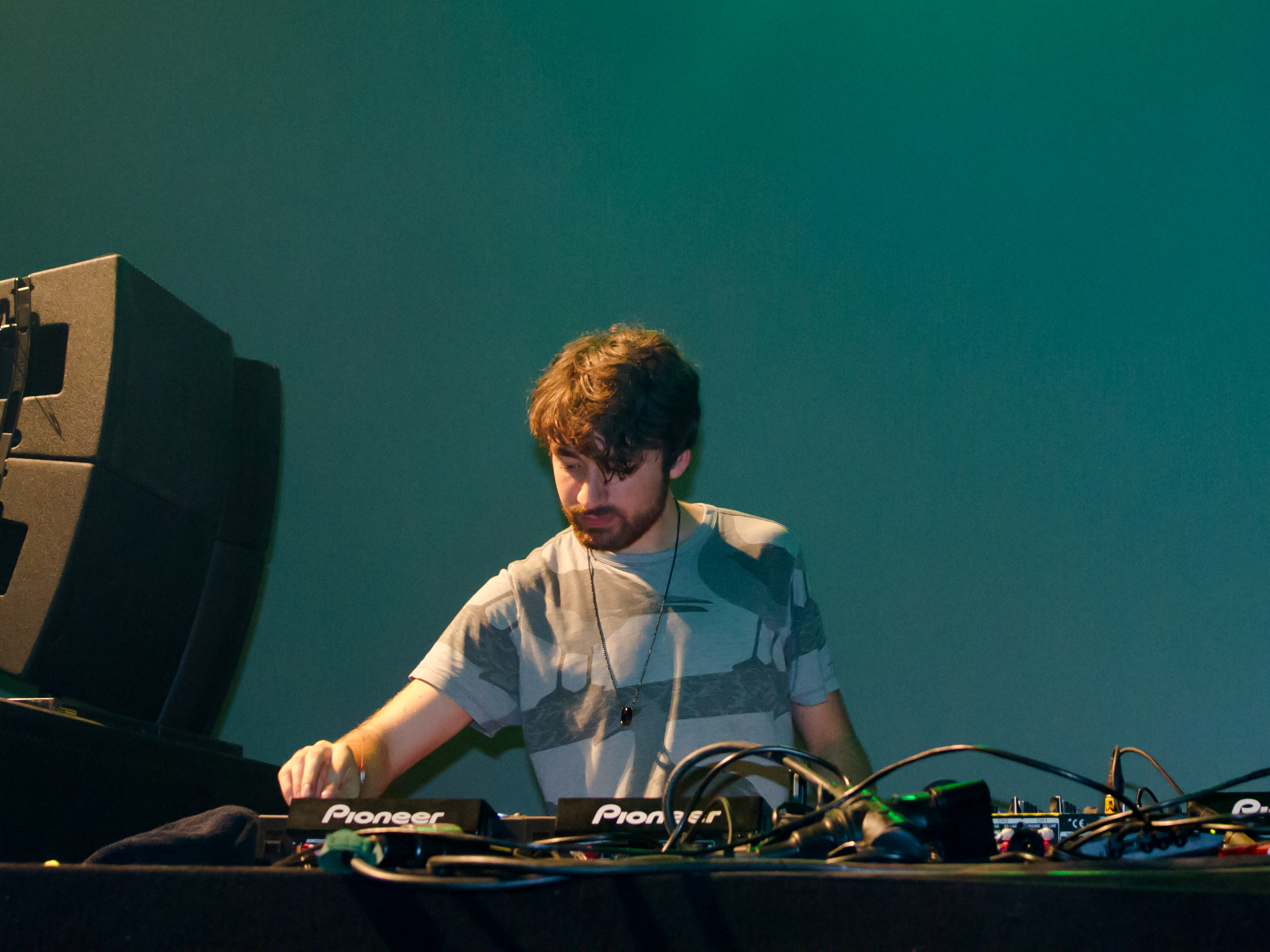 Oliver Heldens beim 14. Airbeat-One Dance Festivals das vom 16. bis 19. Juli 2015 auf dem Flugplatz Neustadt-Glewe stattfand.